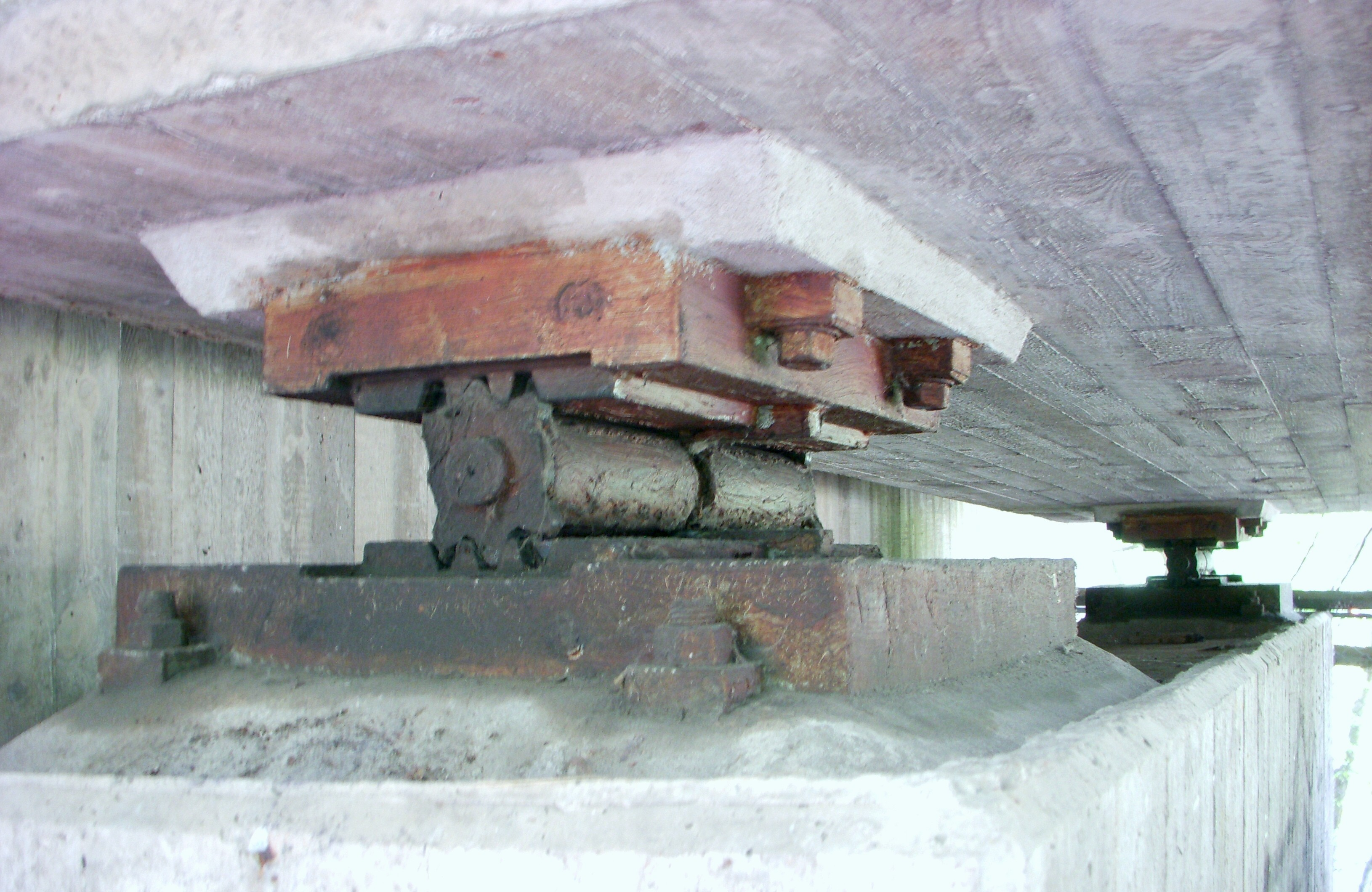 Ett pendellager till en bro